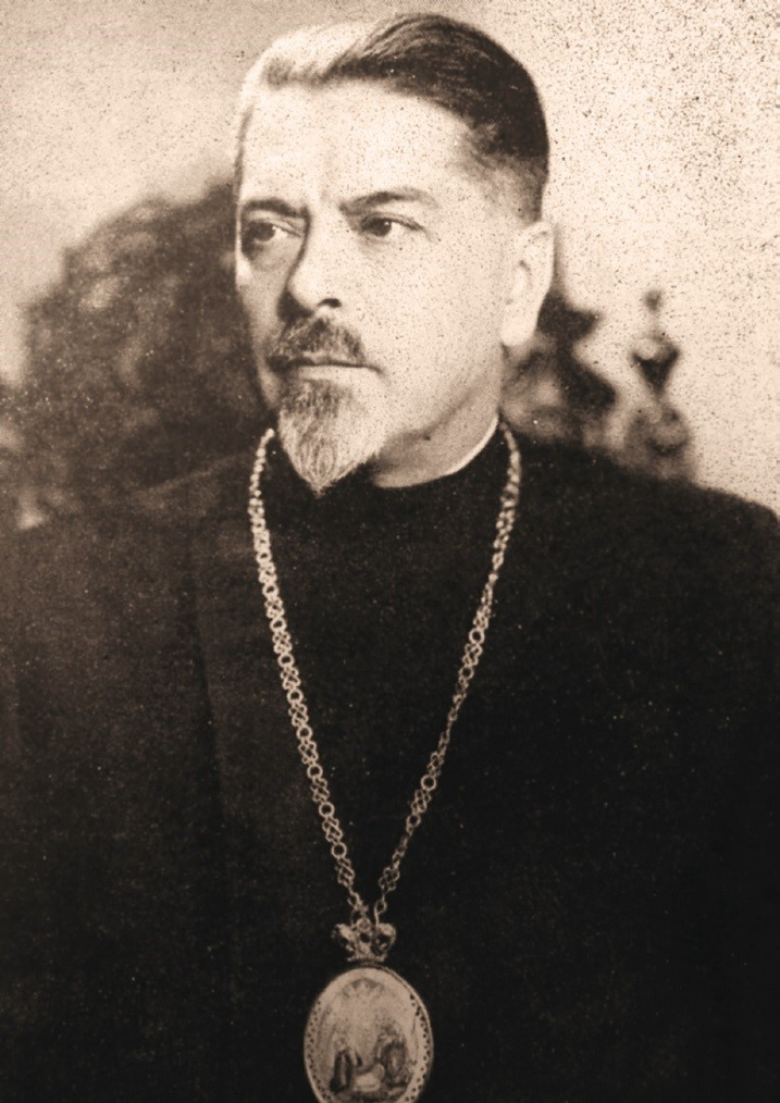 Архиєпископ Мстислав Скрипник, 1948 року